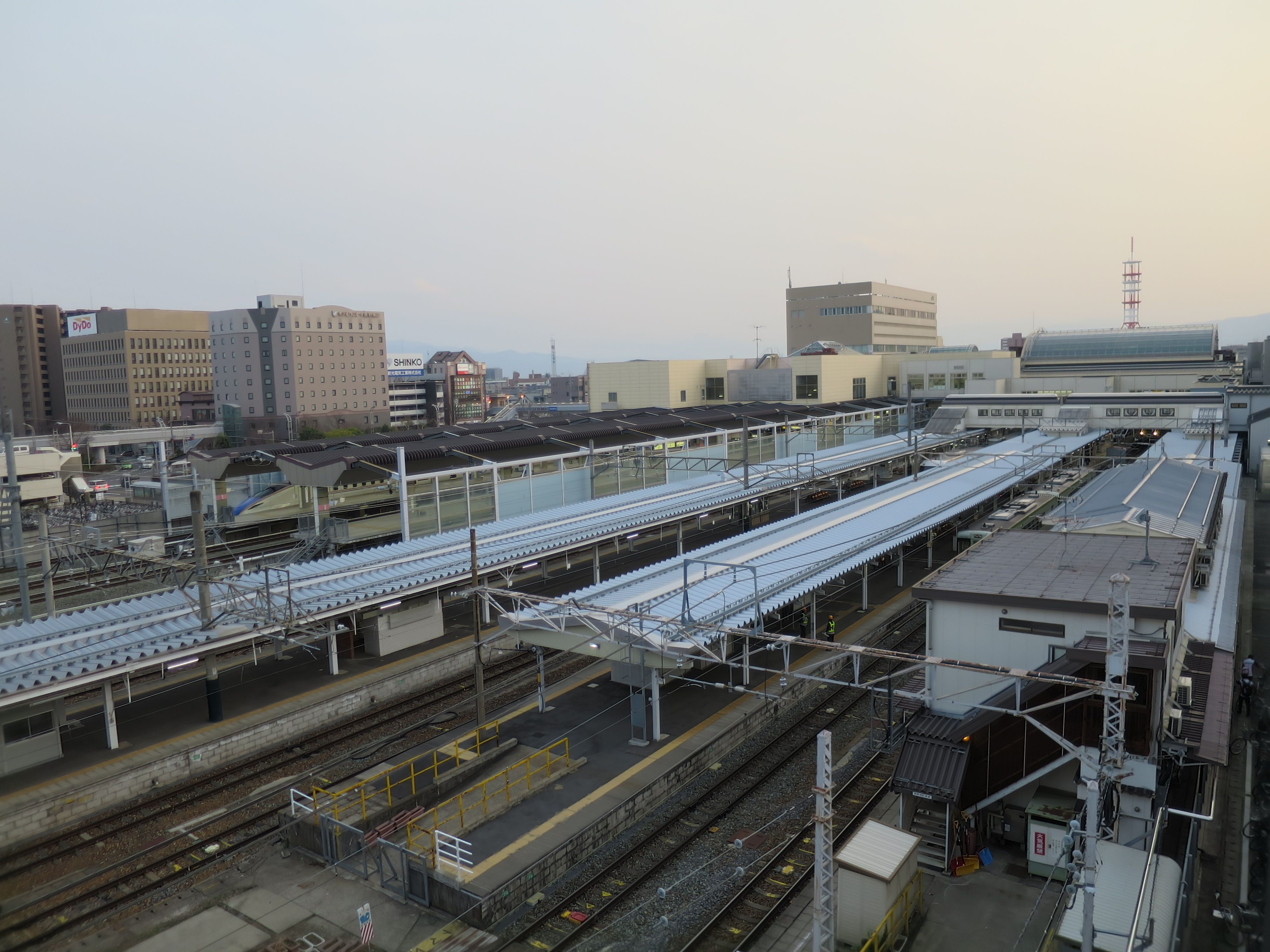 記事「長野駅」での利用を想定しています。